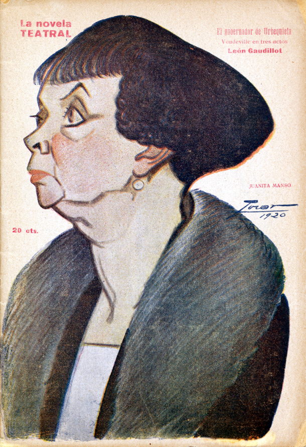 Juanita Manso.